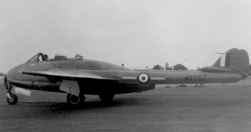 No.613 Squadron Vampire FB.9 WR257